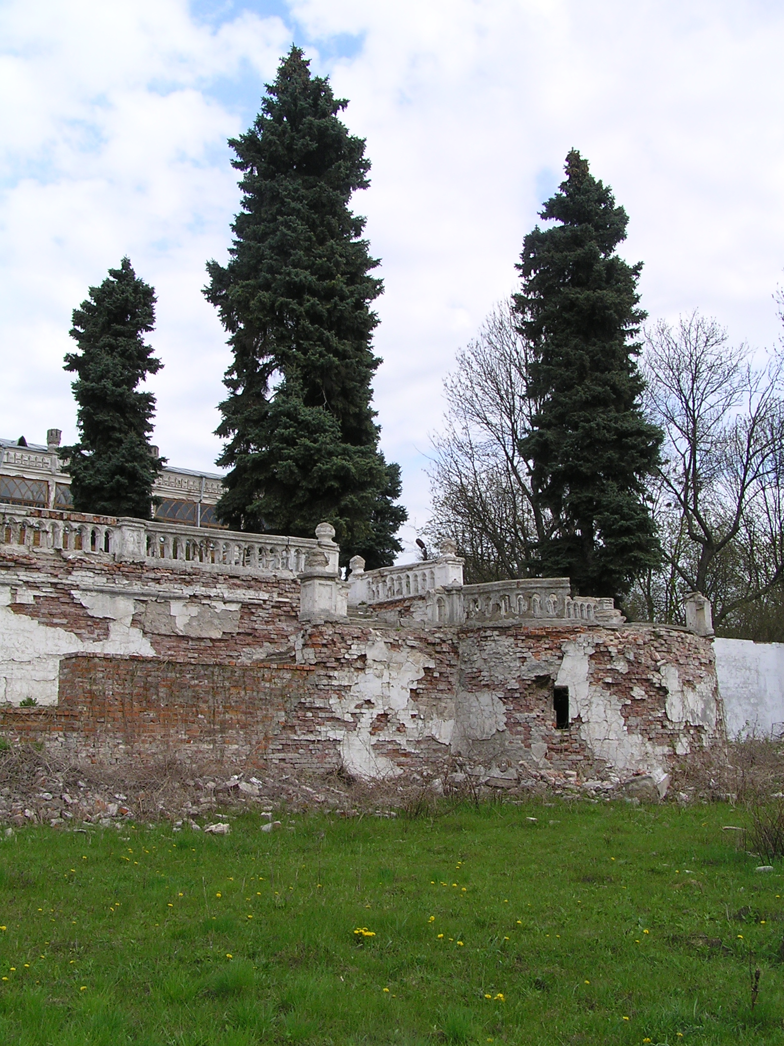 Парк-пам'ятка садово-паркового мистецтва на території тубсанаторію «Шарівка», смт. Шарівка-1, Богодухівський район, Харківська обл.